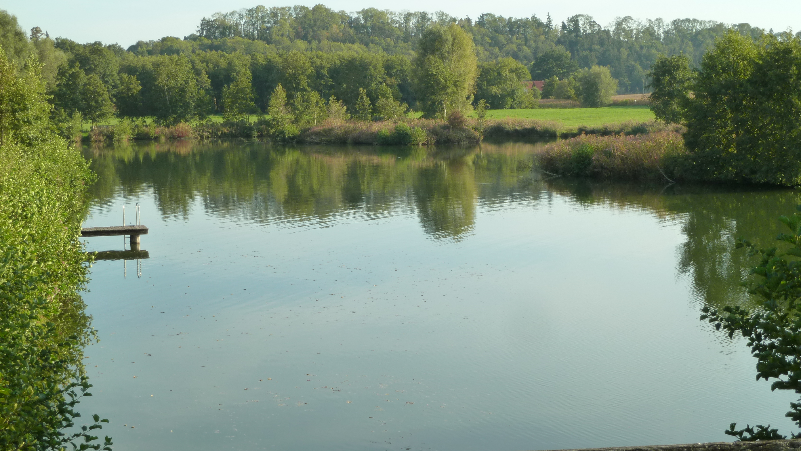 Flossinger See